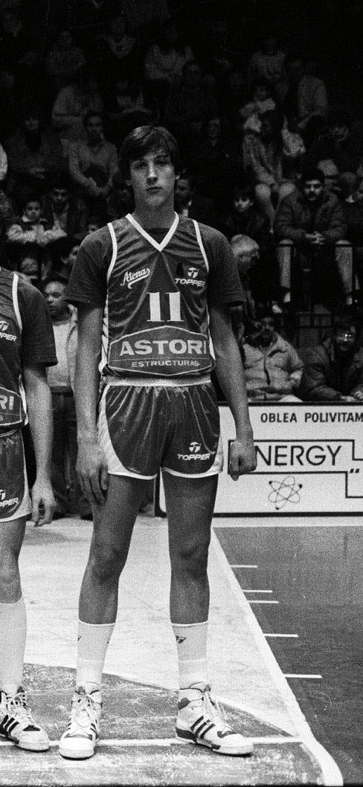 Diego Osella, ex jugador de baloncesto, con la camiseta de Atenas de Córdoba.